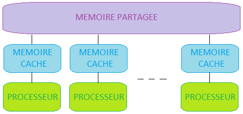 Architecture avec mémoire centrale partagée et plusieurs mémoire cache